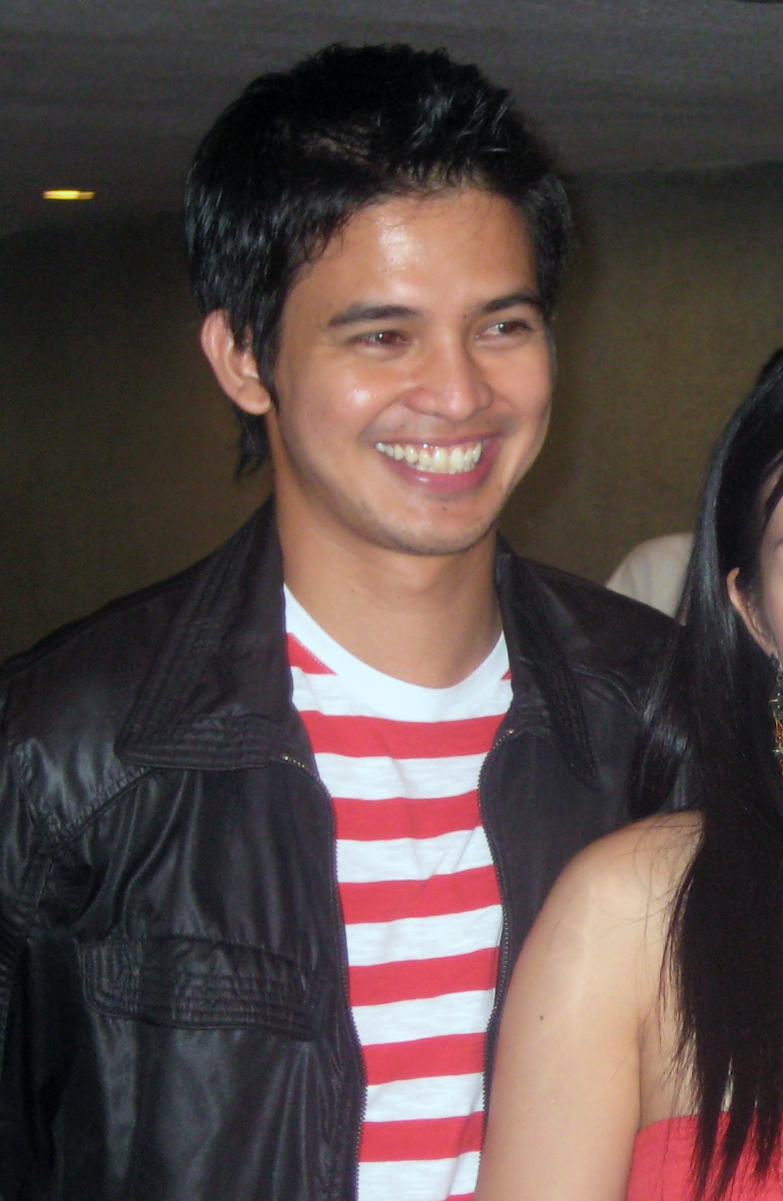 Jason Abalos